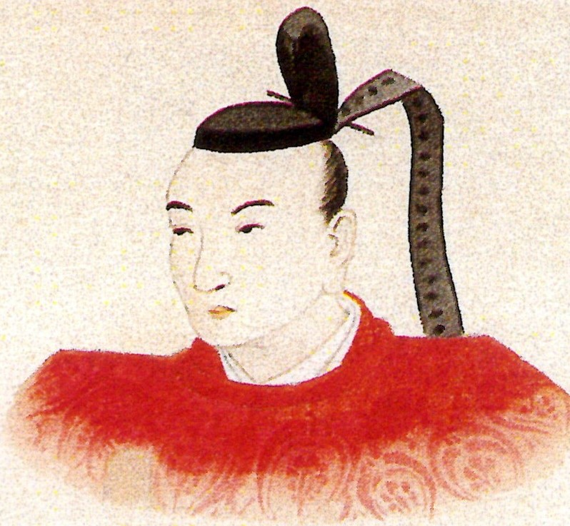 板倉重冬の肖像。